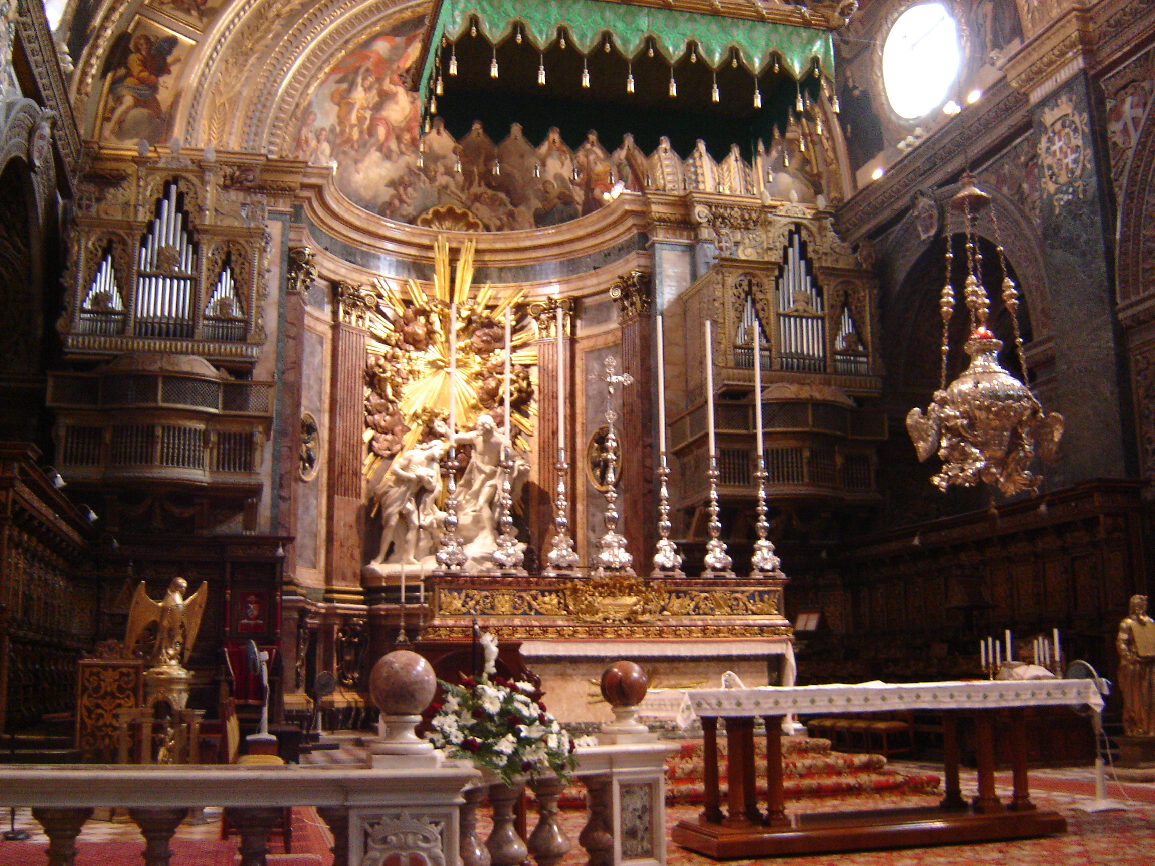 Autel de la Co-cathédrale Saint-Jean de La Valette by Giuseppe Mazzuoli